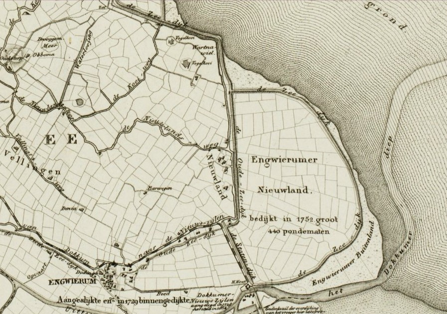 Fragment Nieuwland en Engwierumer Nieuwland bij Engwierum.